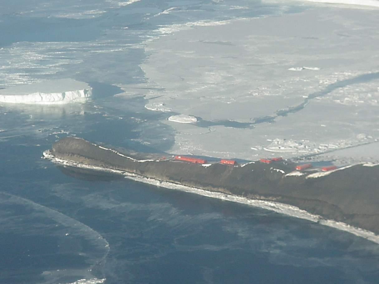 Base Matienzo, Antarctica